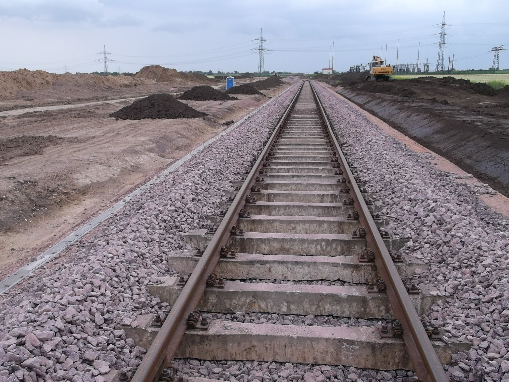 Industriebahn Halle-Queis - Stammgleiserweiterung für das "Industriegebiet Halle-Saalkreis an der A14" (IGHS) im Jahr 2012